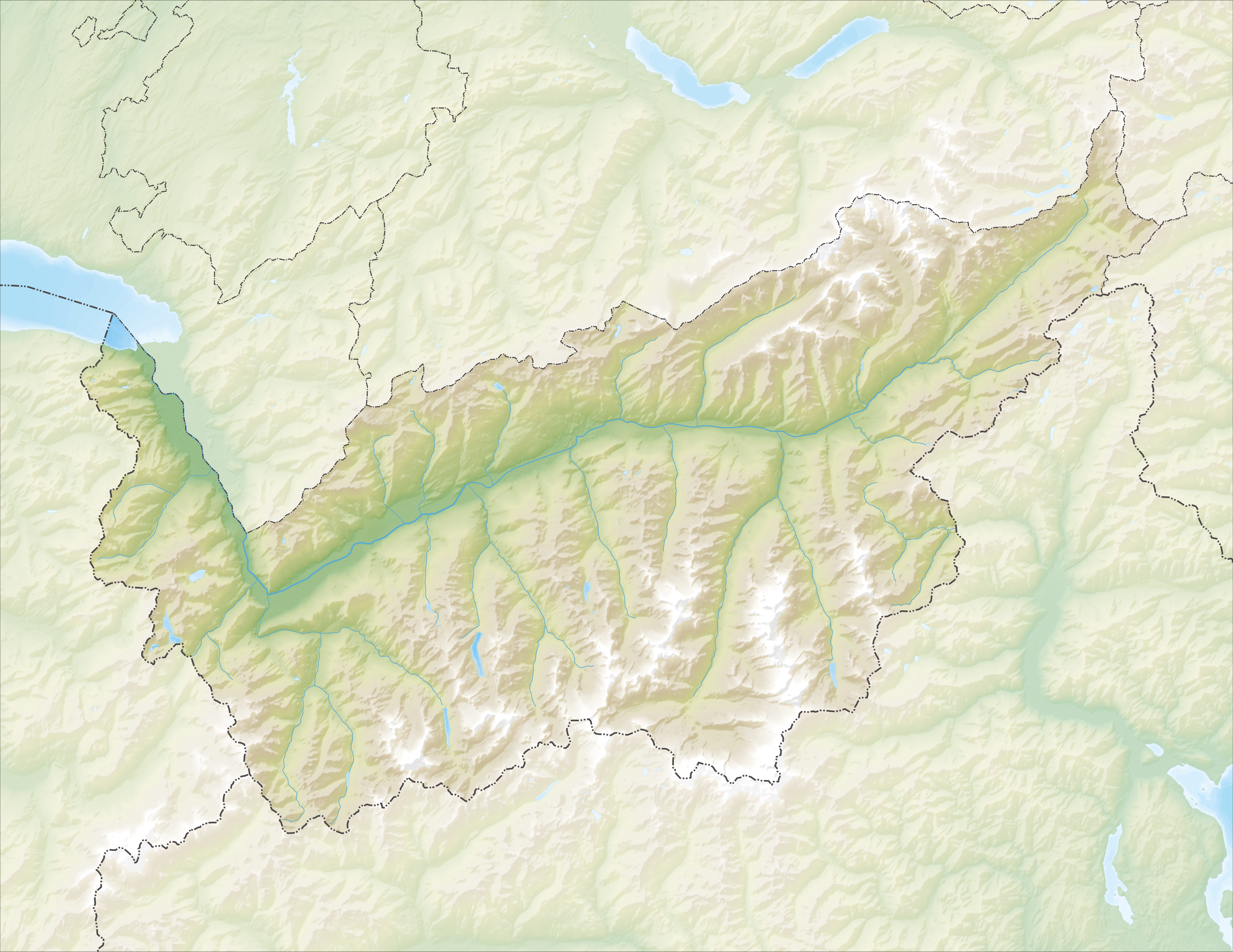 Reliefkarte des Kantons Wallis Topographischer Hintergrund: NASA Shuttle Radar Topography Mission (public domain). SRTM3 v.2.